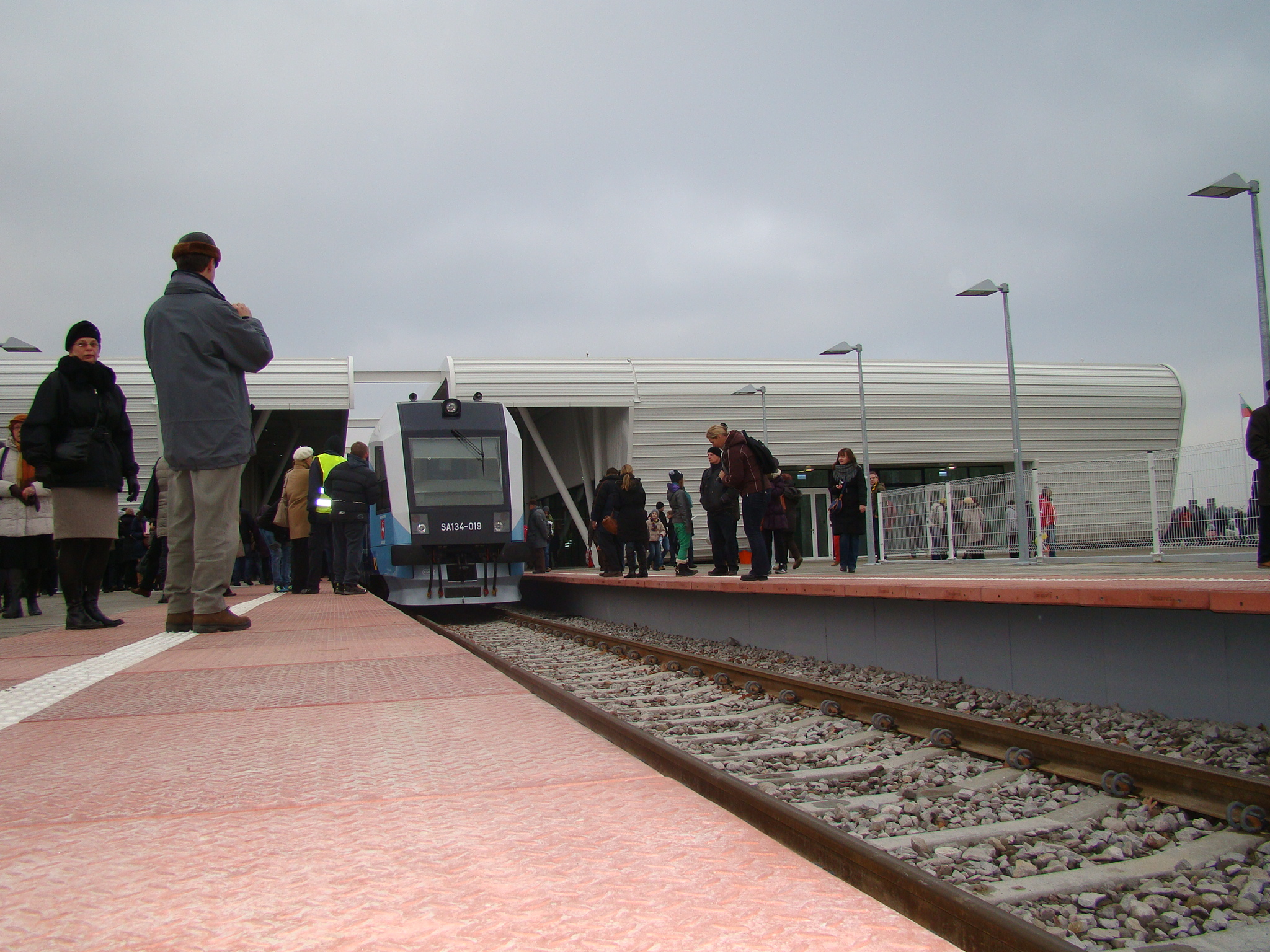 Dzień otwarty w Porcie Lotniczym Lublin, szybka kolej do Lublina. 1 grudnia 2012 roku.